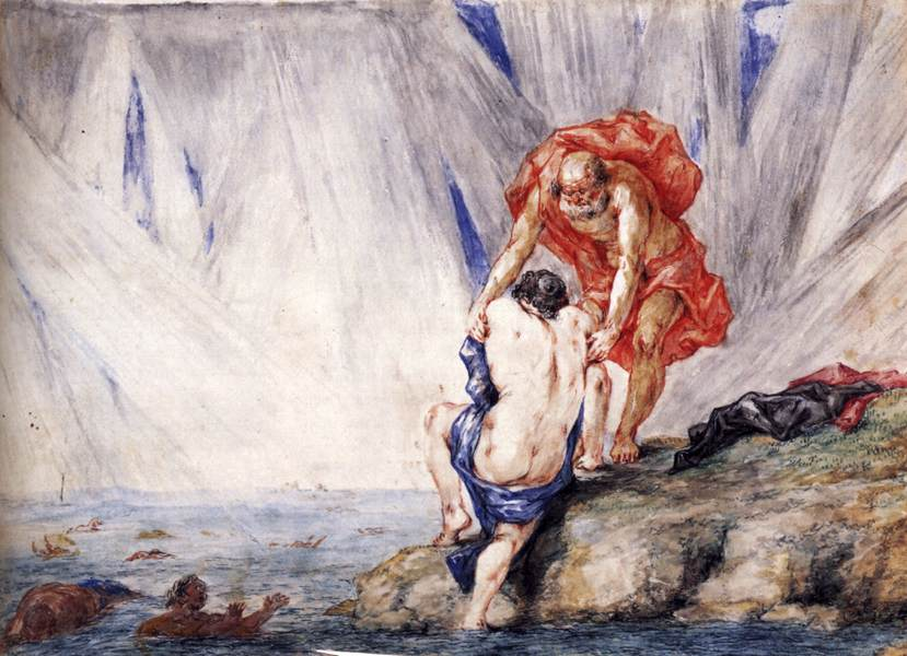 Tableau représentant une scène des Métamorphoses d'Ovide : Deucalion aide Pyrrha à échapper au Déluge envoyé par Zeus pour détruire le reste de l'humanité devenue mauvaise.